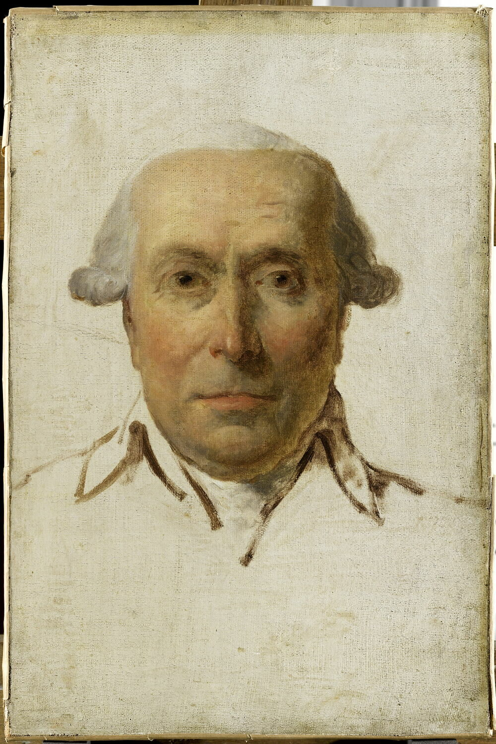 Ritratto di Filippo Mazzei, Paris, Louvre